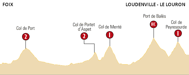 Profile of stage 15 of the 2007 Tour de France - 15e etappe v/d Ronde van Frankrijk 2007